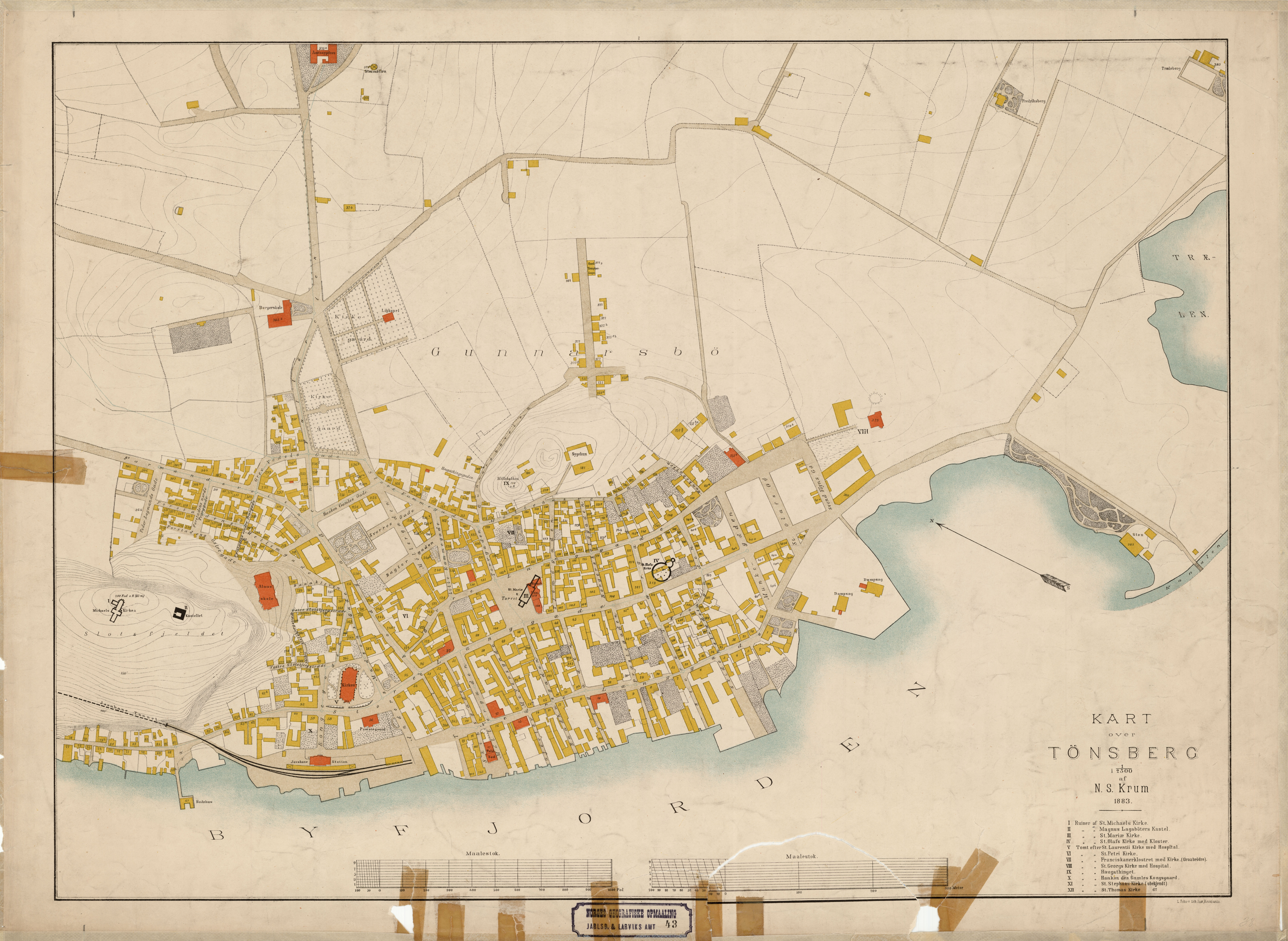 Kart over Tønsberg. Lit. L. Fehrs lit. Anstalt. Kristiania.